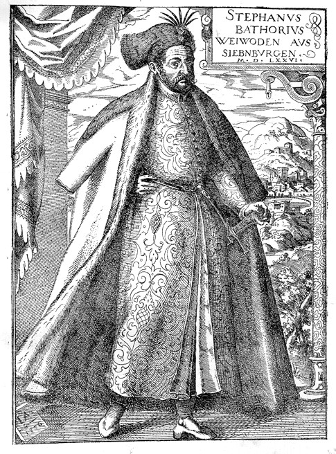 Somlyai Báthori István (1533-1586)